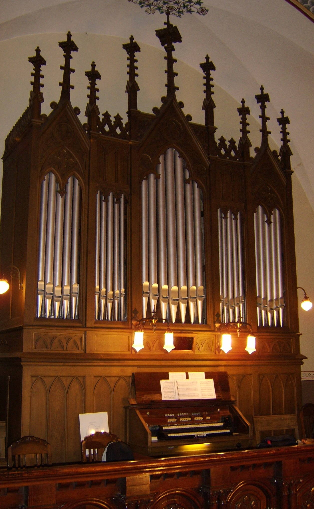 Voigt-Orgel der Henrietten-Kirche in Annahütte